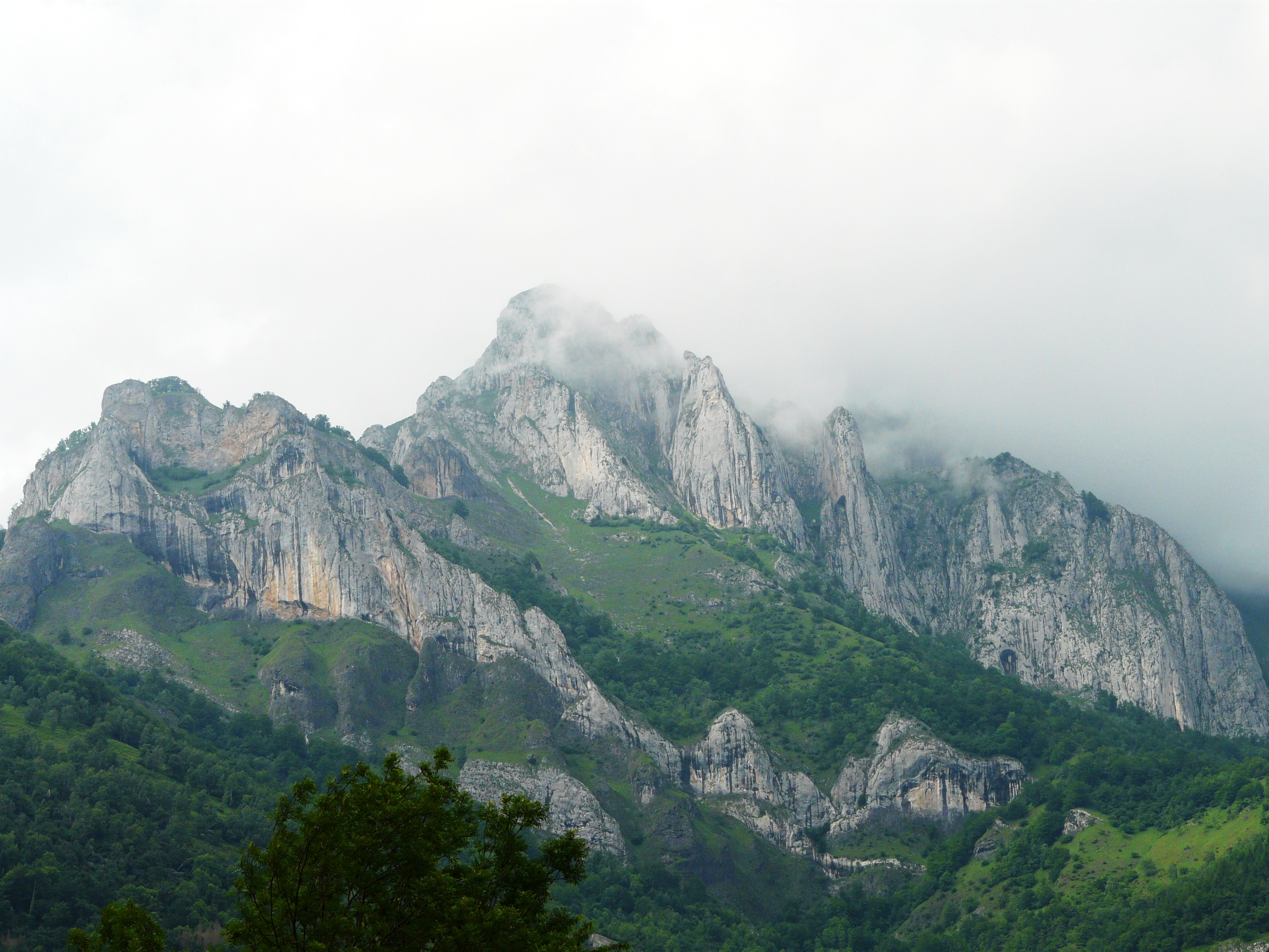 Le Pic du Gar vu du côté de Bezins-Garraux, Haute-Garonne, France.